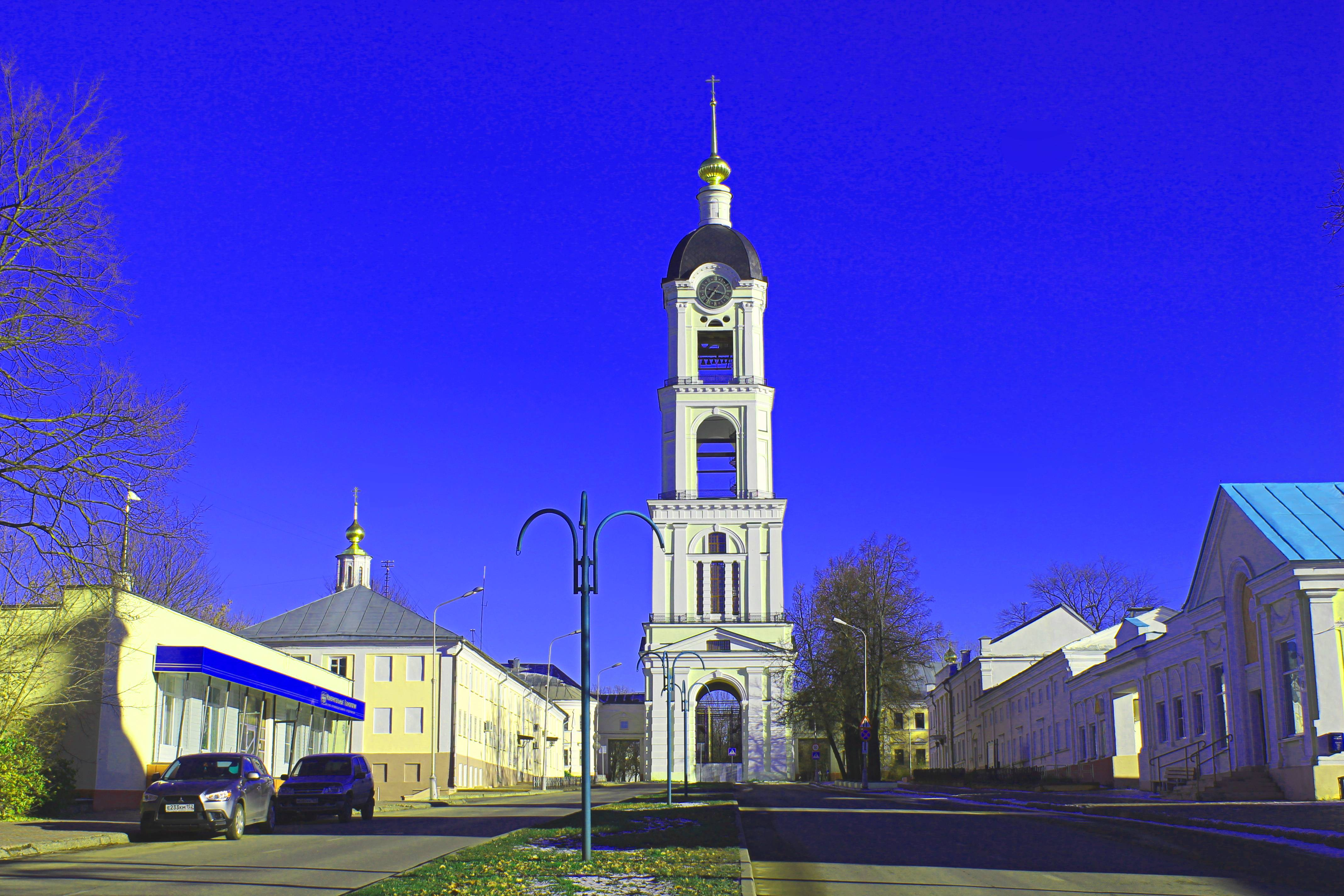 колокольня (Нижегородская область, Саров, проспект Мира, 27)